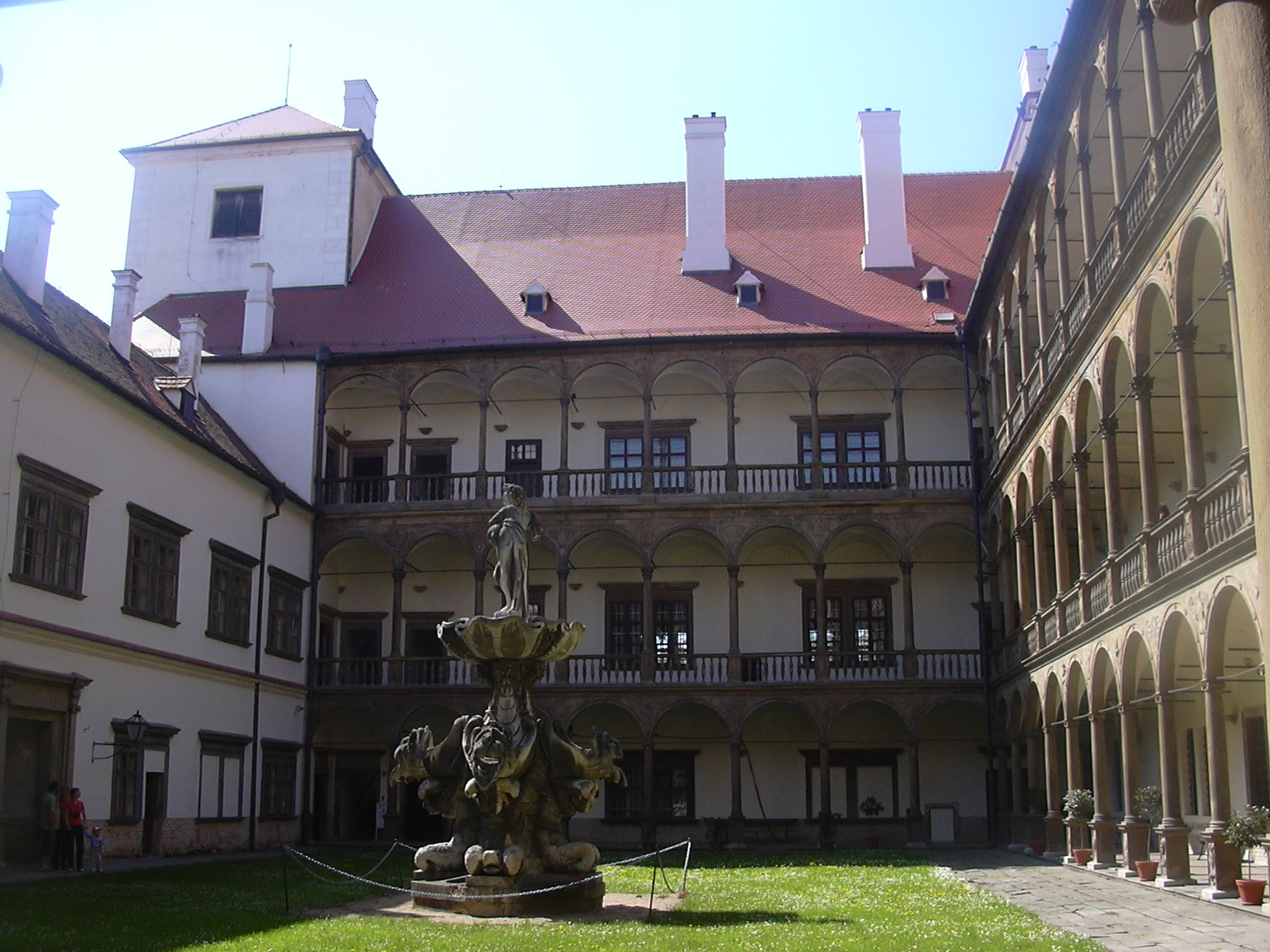 Státní zámek Bučovice